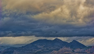 sierra elvira